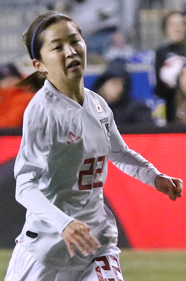 Risa Shimizu & Megan Rapinoe